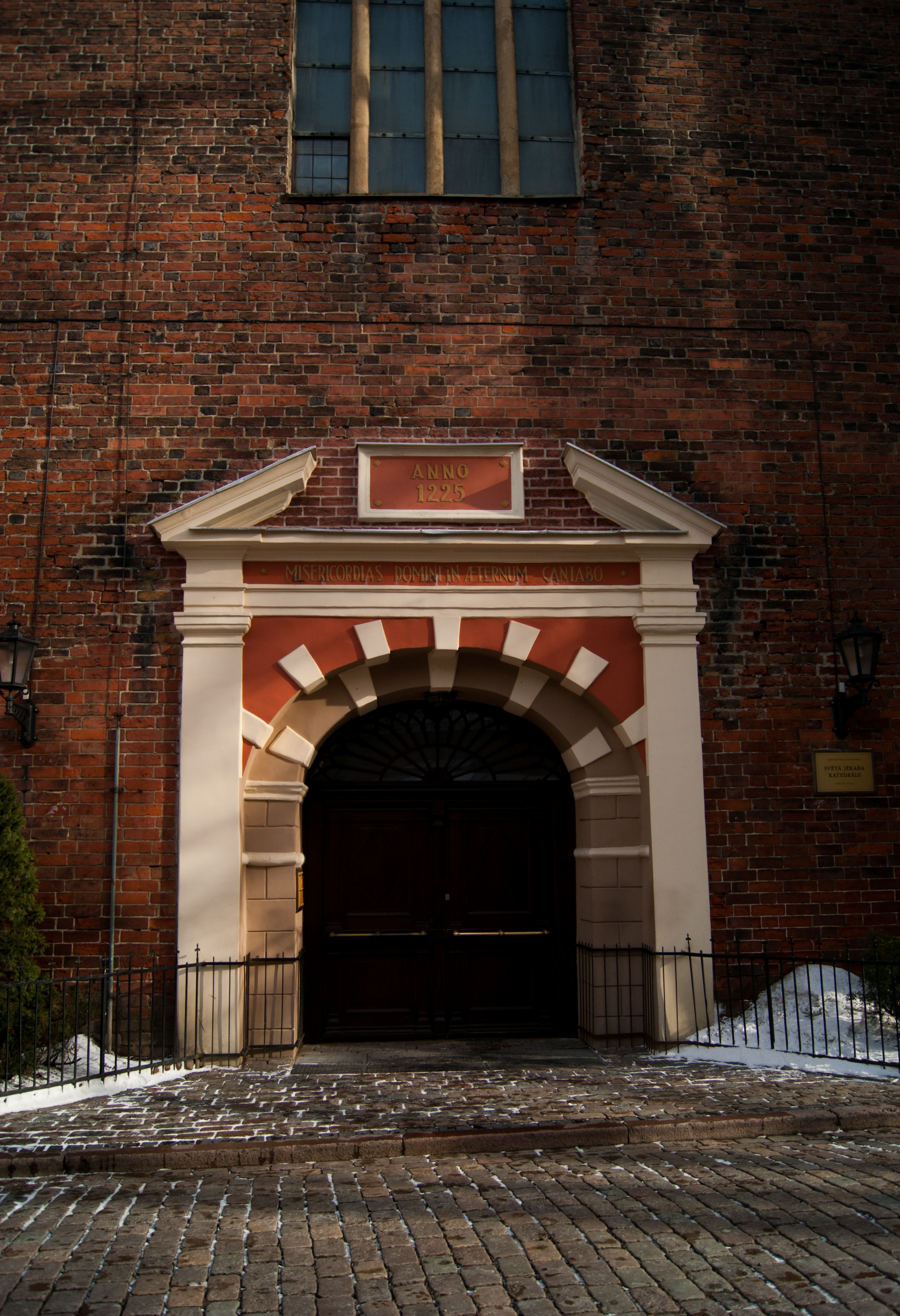 Church in Riga